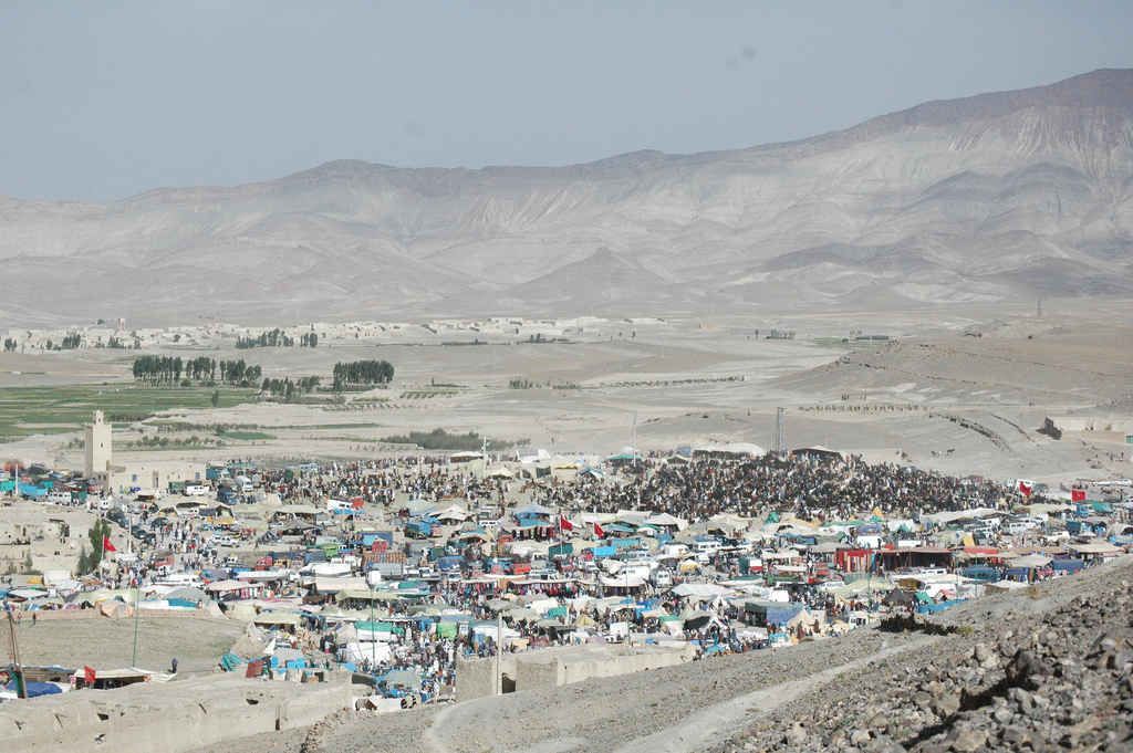 imlchil